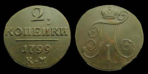 2 копейки Павла I 1799, медь, Колыванский монетный двор